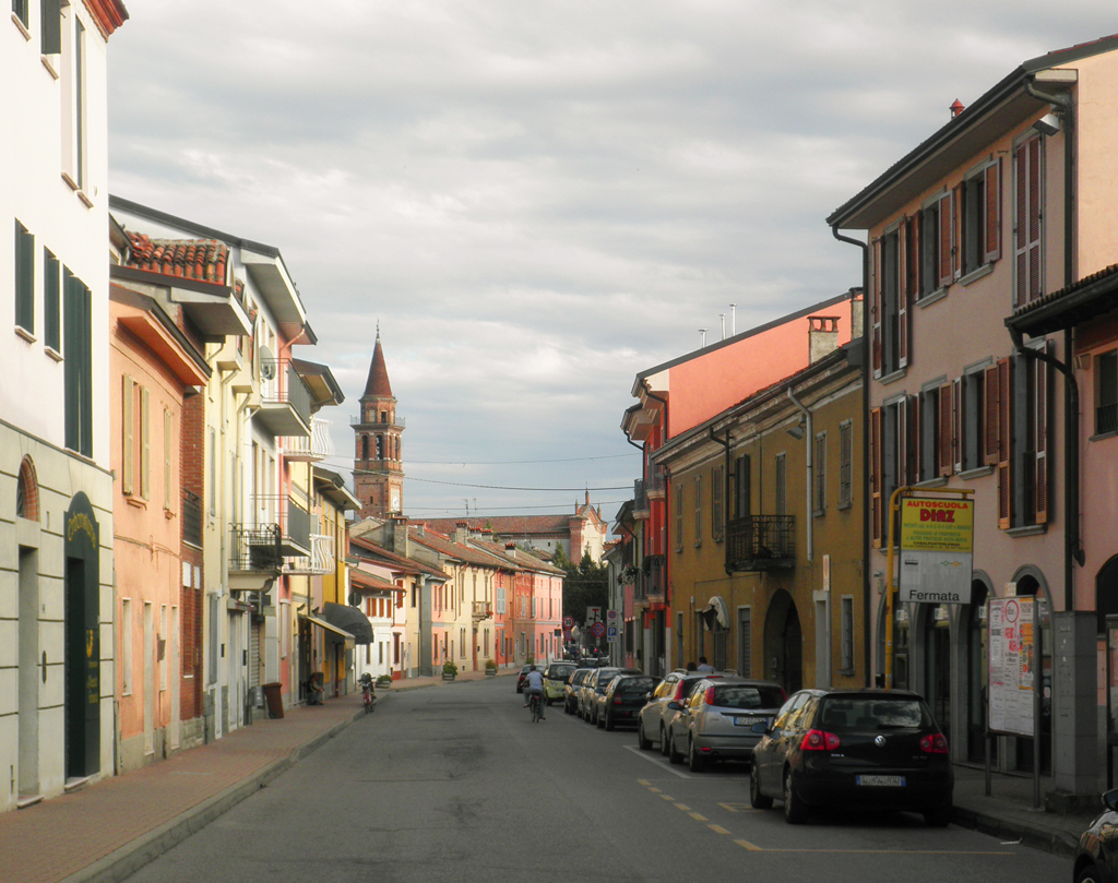 Via Balbi a Ospedaletto Lodigiano.